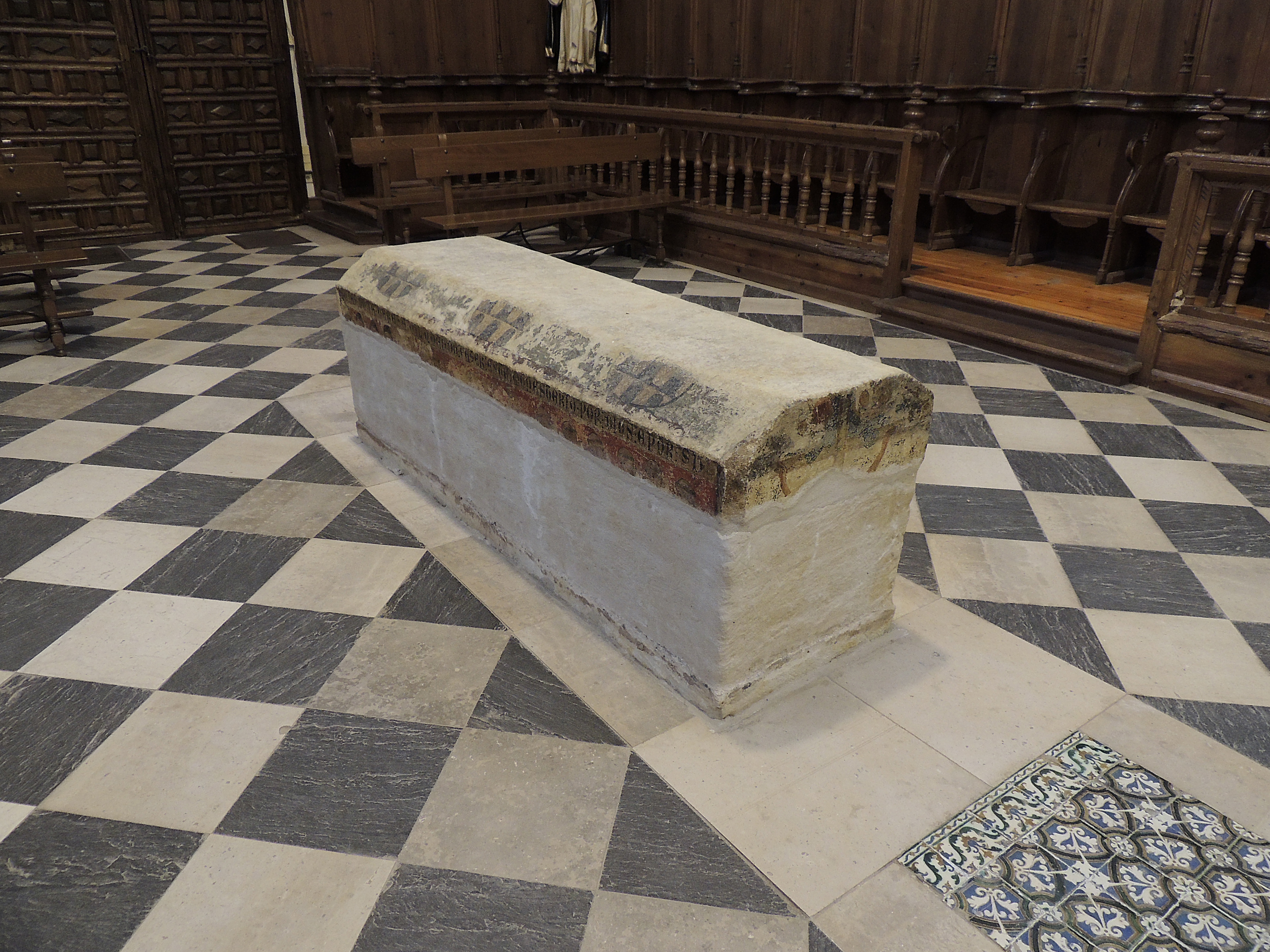 Sepulcro de Teresa Gil en el coro del monasterio del Sancti Spiritus de Toro